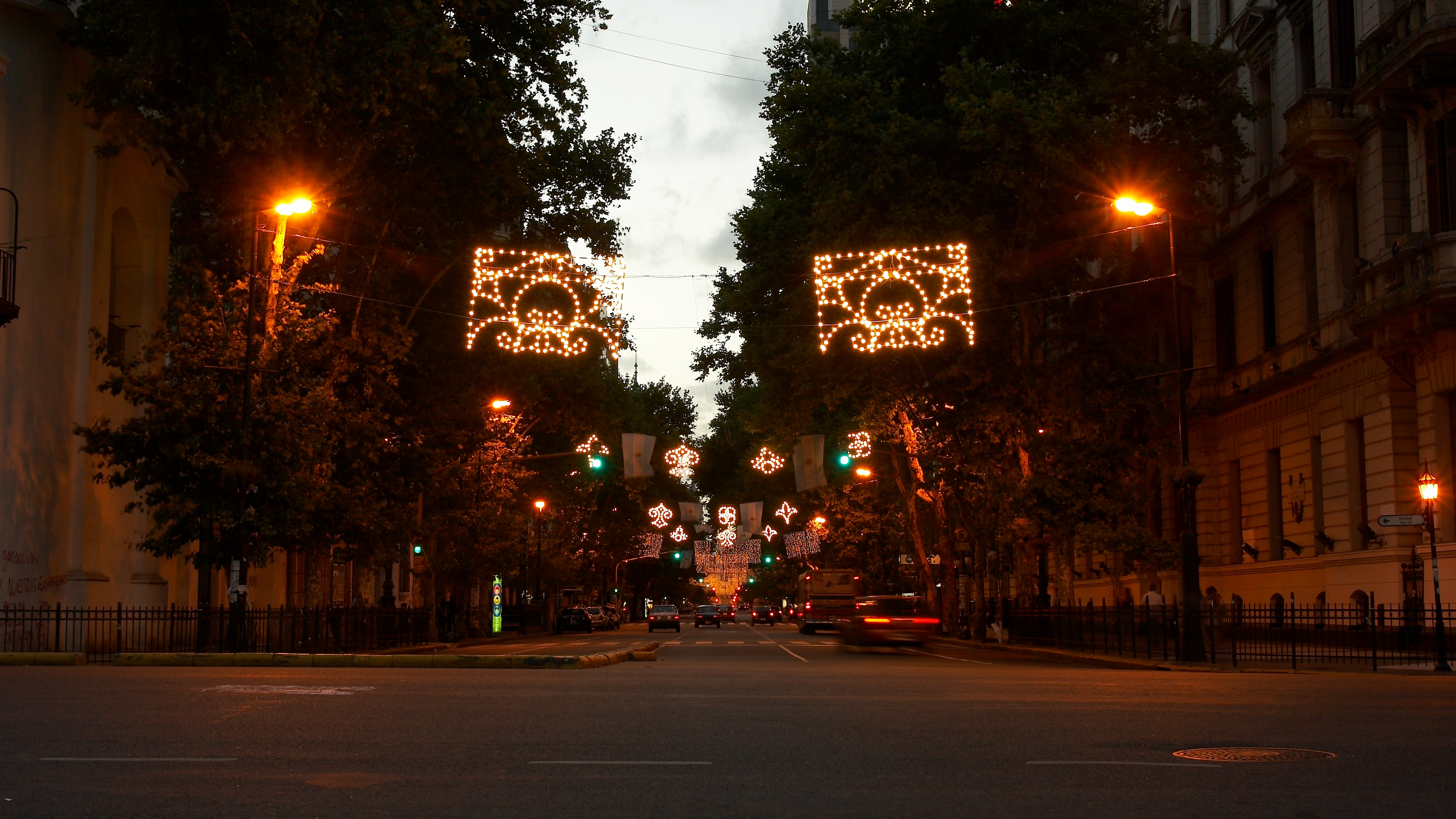 Avenida de Mayo y Bolívar, barrio de Monserrat, Buenos Aires, Argentina.